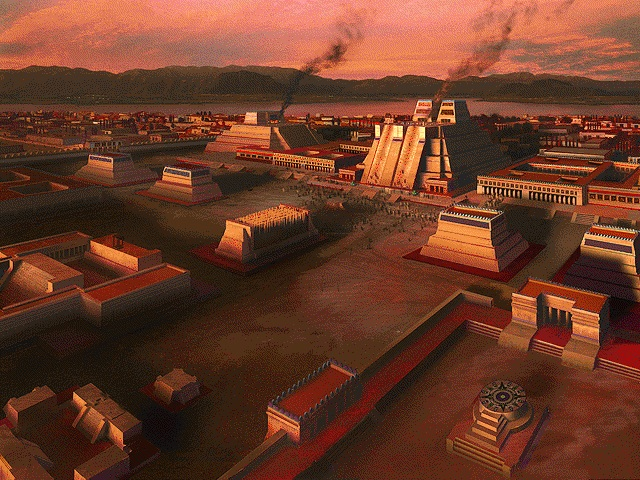 Tenochtitlán em seu esplendor